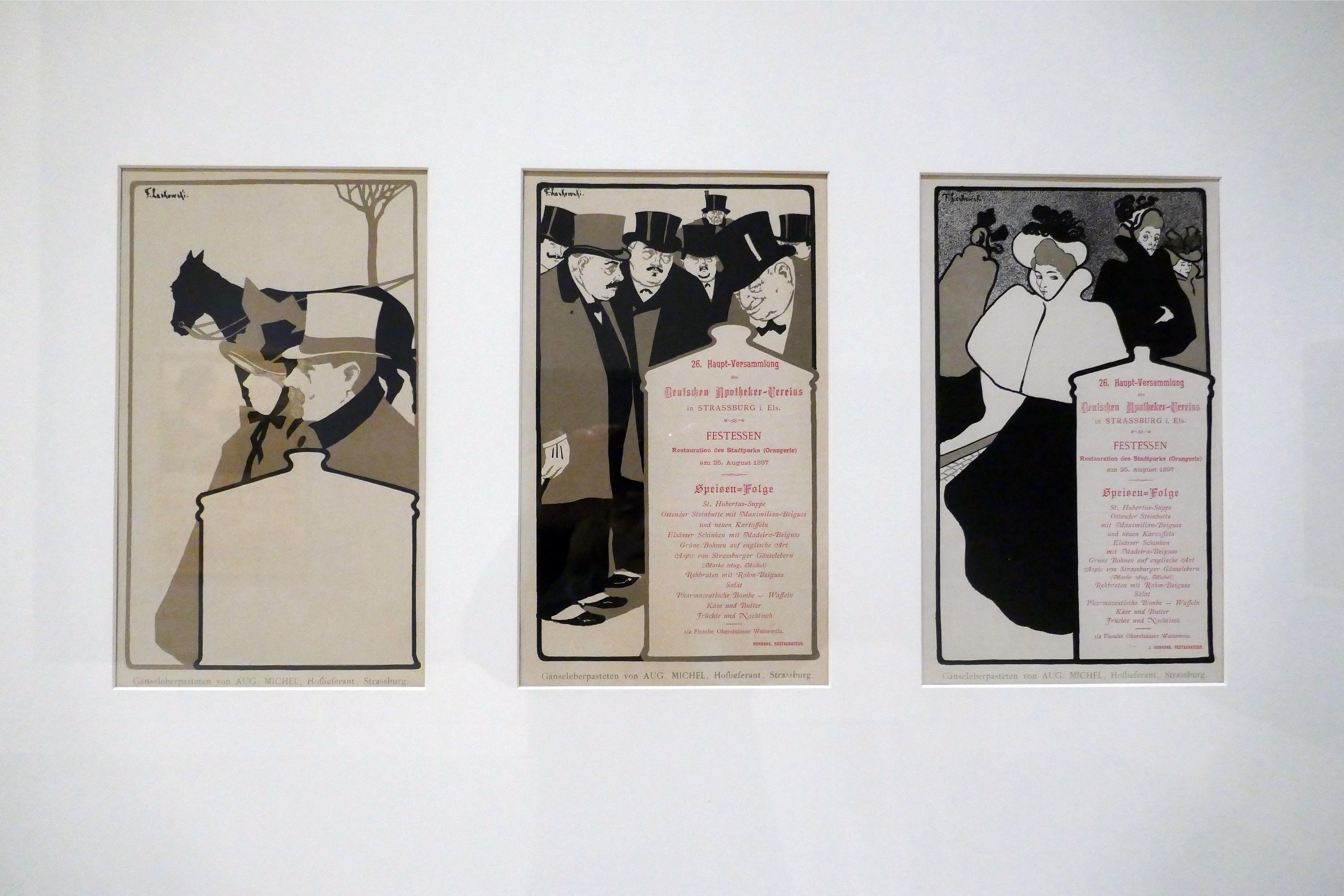 François Laskowski. Menus publicitaires, foies gras Michel. 1904. Lithographie. Cabinet des estampes et des dessins de Strasbourg. Exposition Laboratoire d'Europe Strasbourg, 1880-1930 au Musée d'art moderne et contemporain de Strasbourg.